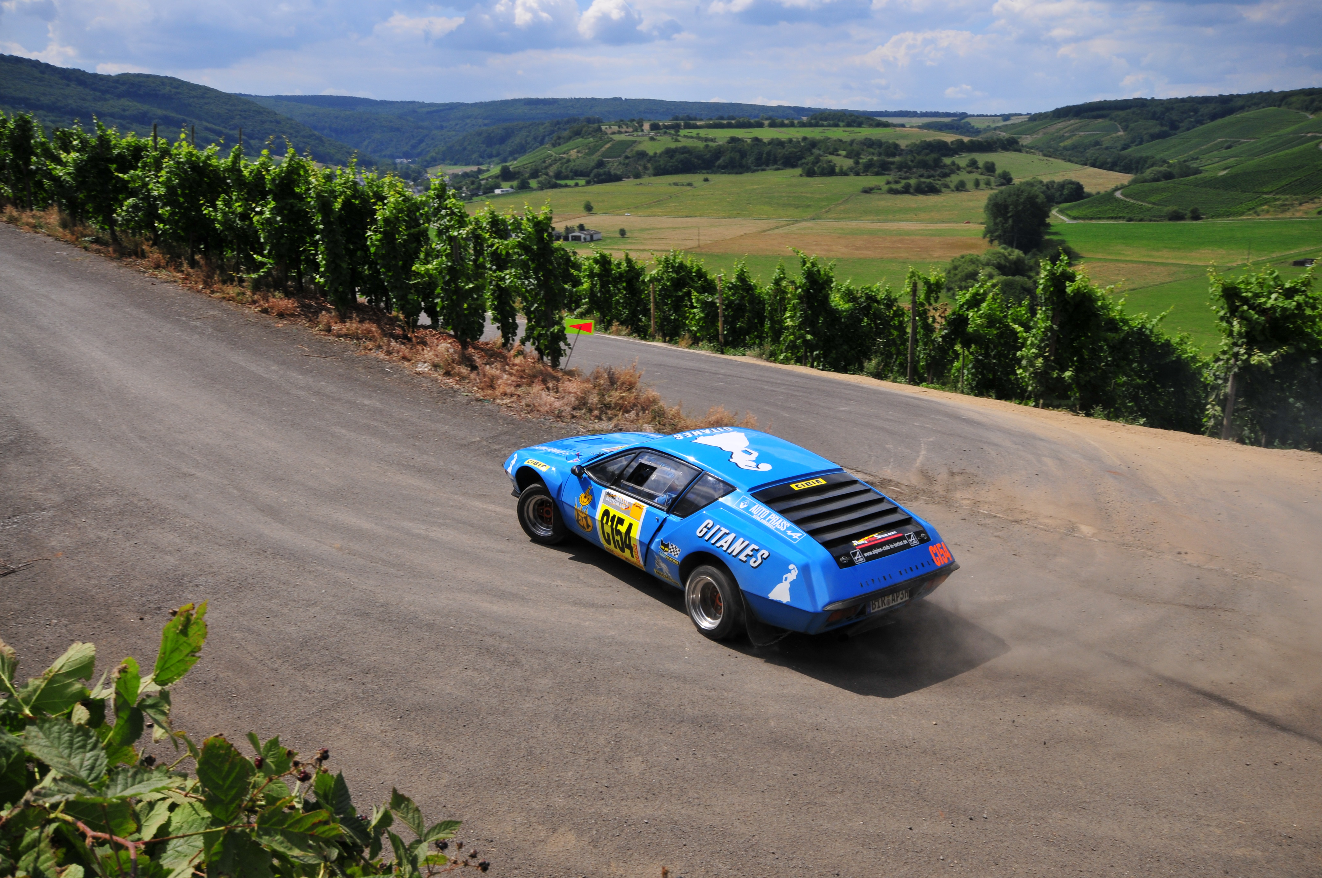 Renault Alpine A310 driven during the 2008 Rallye Deutschland.